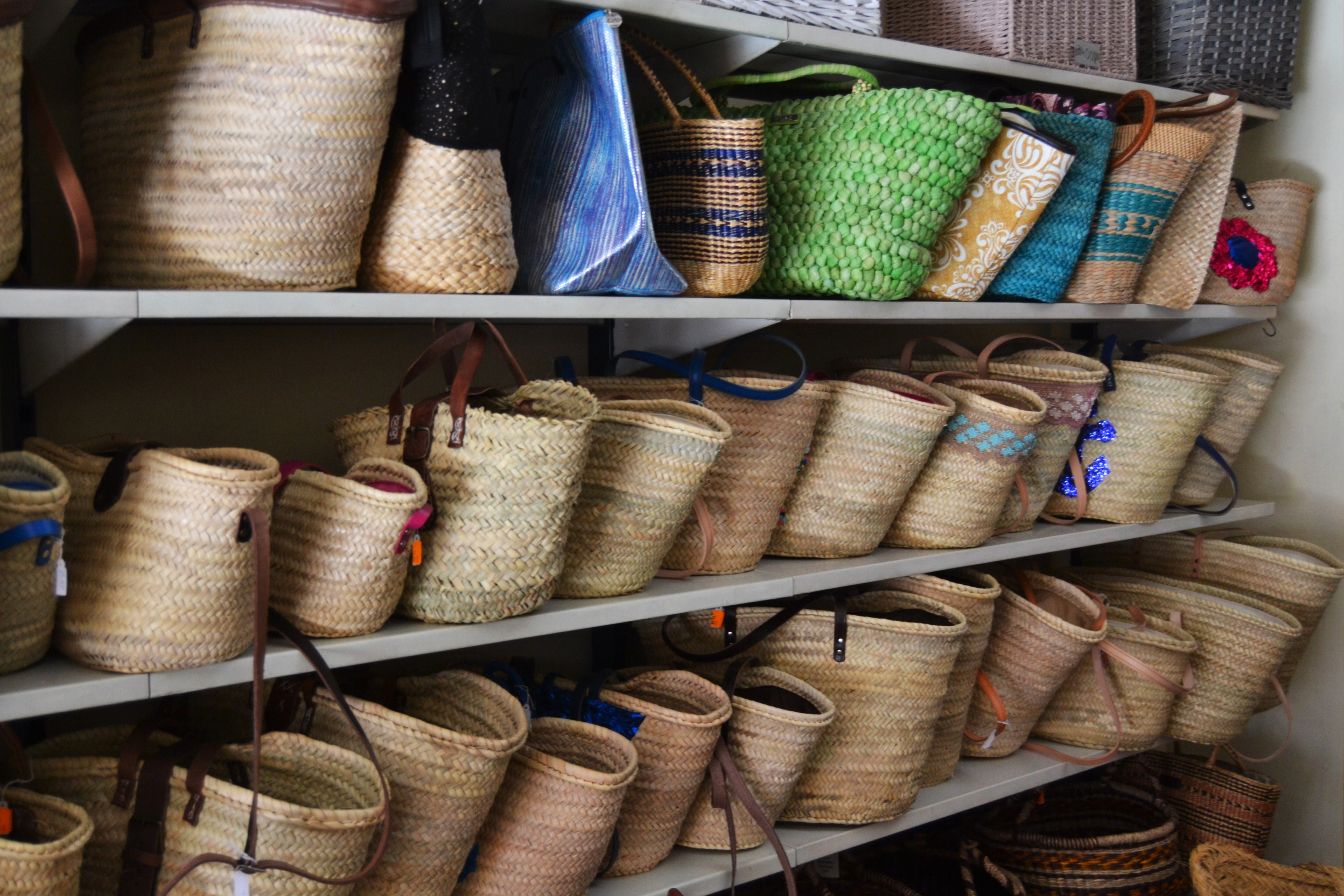 Barxes a una botiga de Gata de Gorgos.